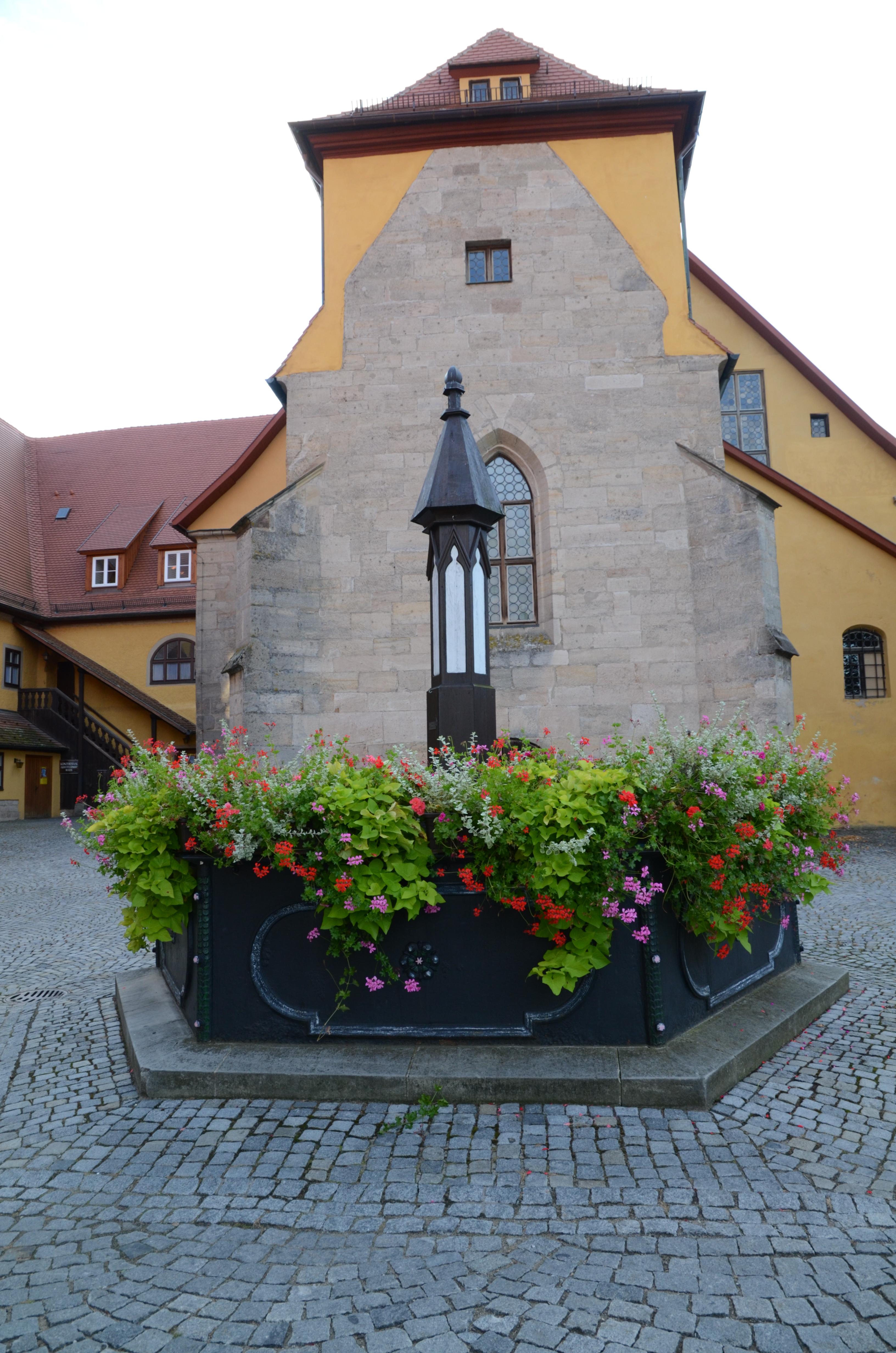 Dinkelsbühl Dr.-Martin-Luther-Straße 6 a und b Laufbrunnen